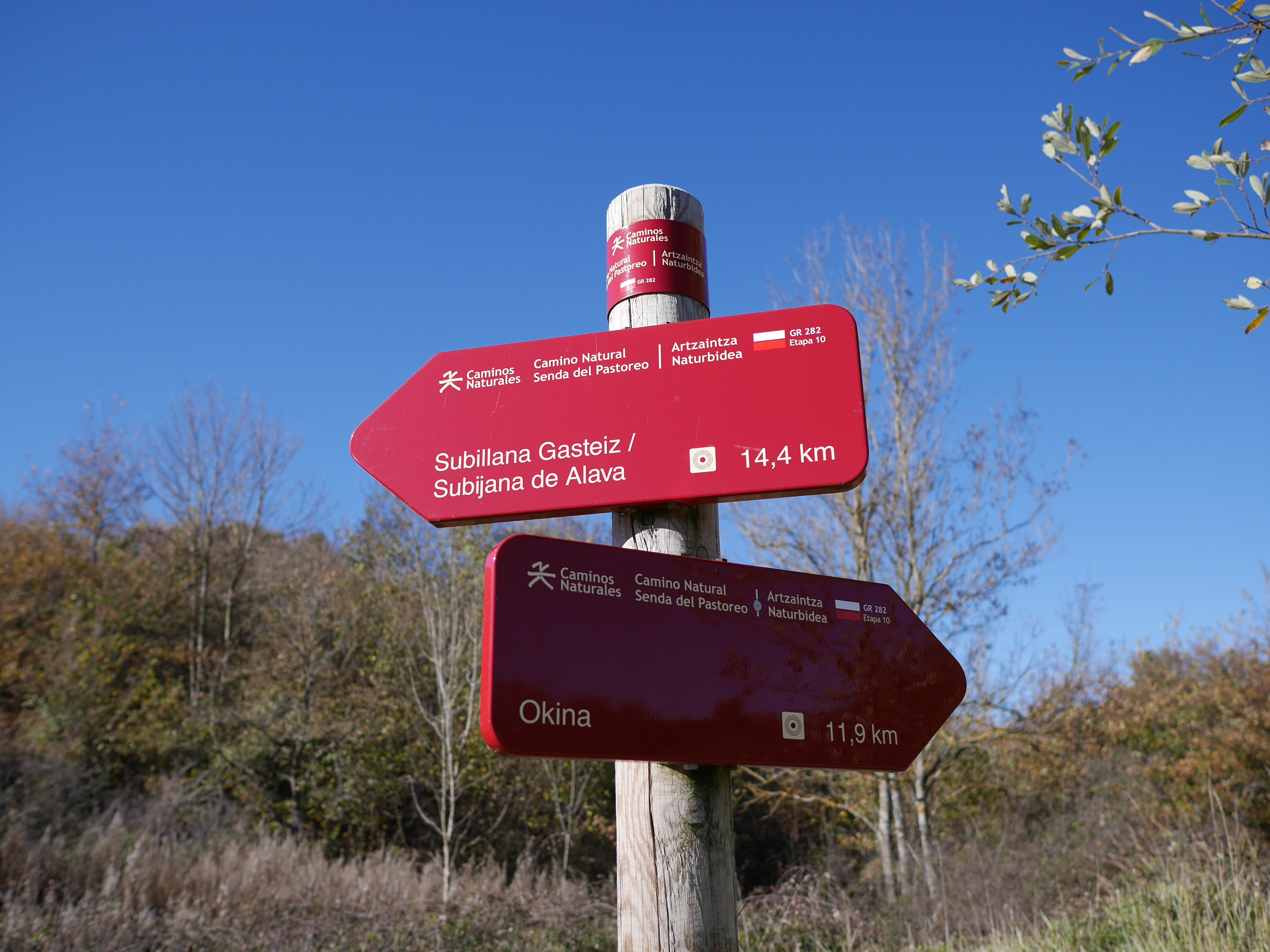 Wegweiser des Weitwanderwegs 282 "Sendero del Pastoreo" ("Hirtenweg") in der Nähe der Passhöhe "Puerto de Vitoria". Álava, Baskenland, Spanien